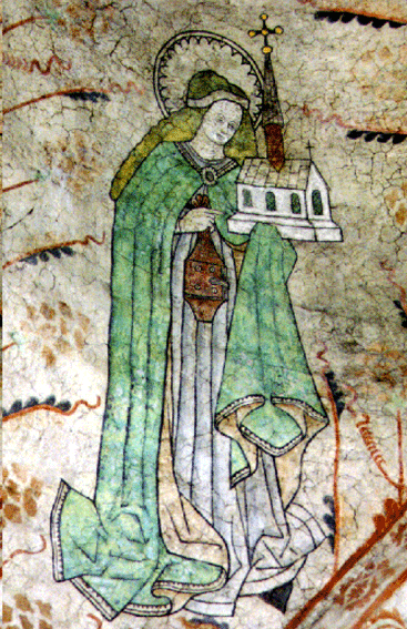 Gertrud i Knivsta Kyrka